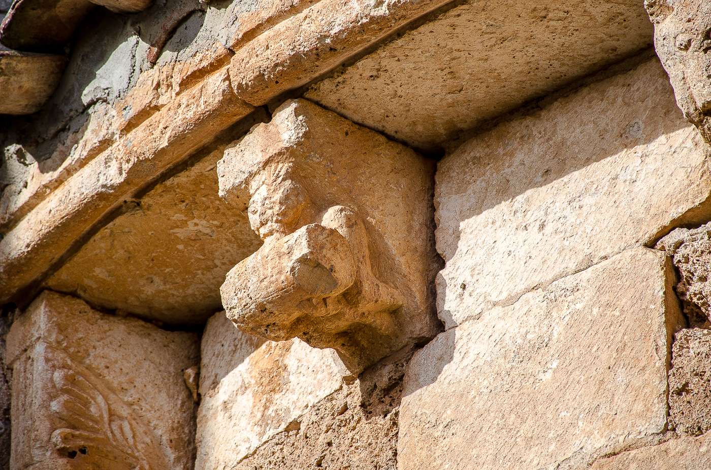 Dolio (instrumento musical). Canecillo en la iglesia de San Román Mártir de Tablada de Villadiego. Intérprete de dolio. Siglo XII.